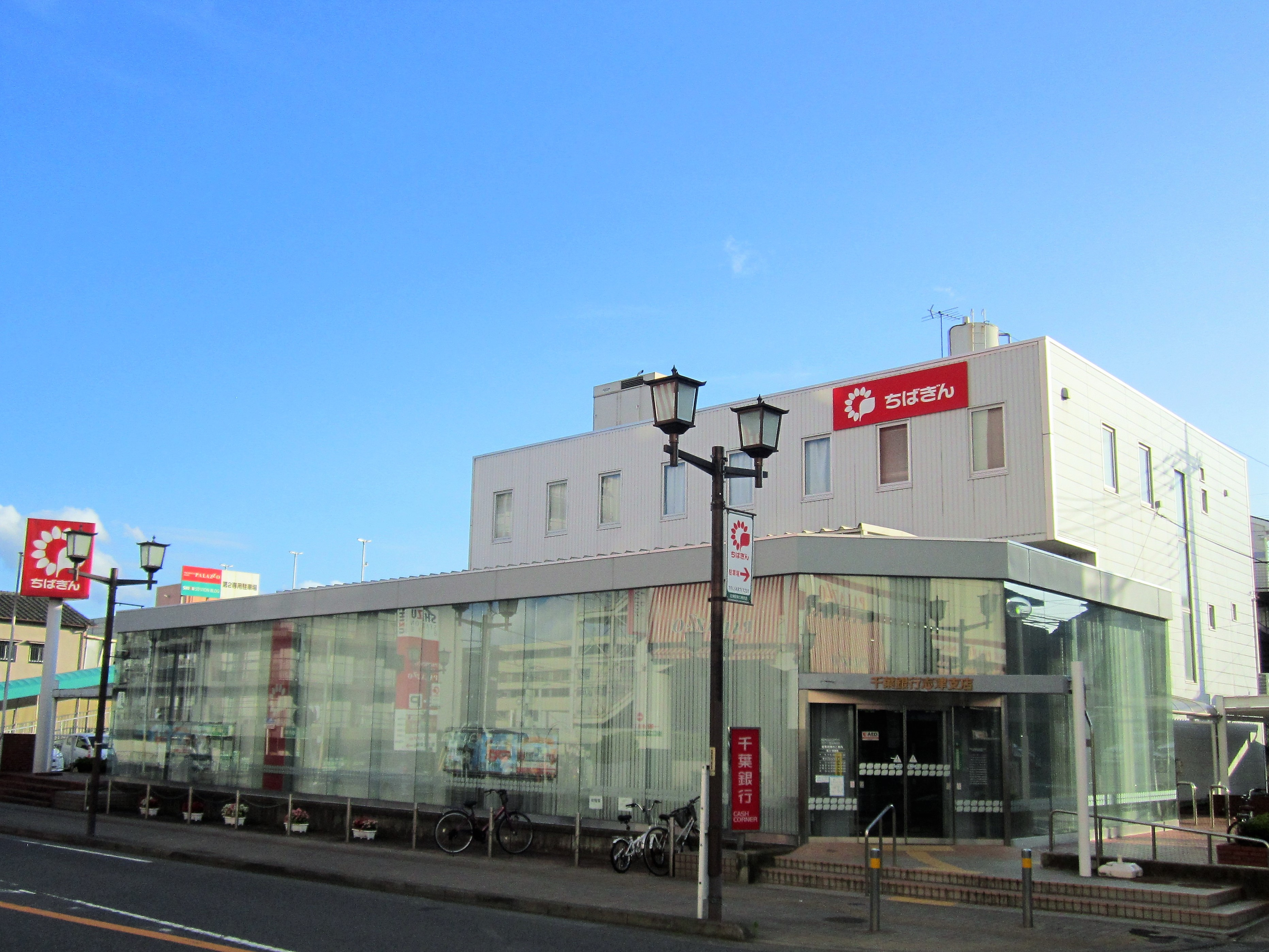 千葉銀行志津支店（佐倉市上志津）